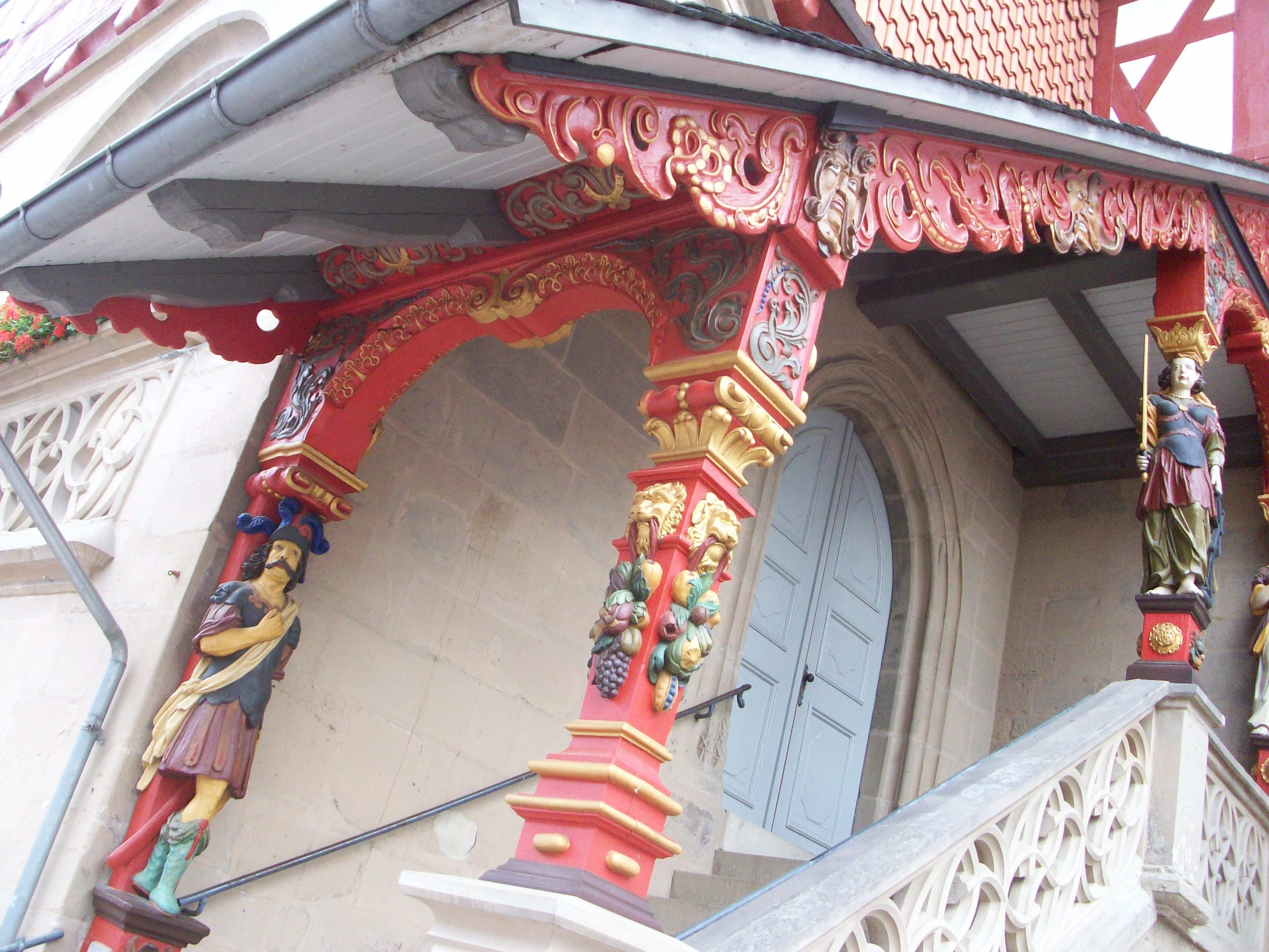 Rathaus in Duderstadt